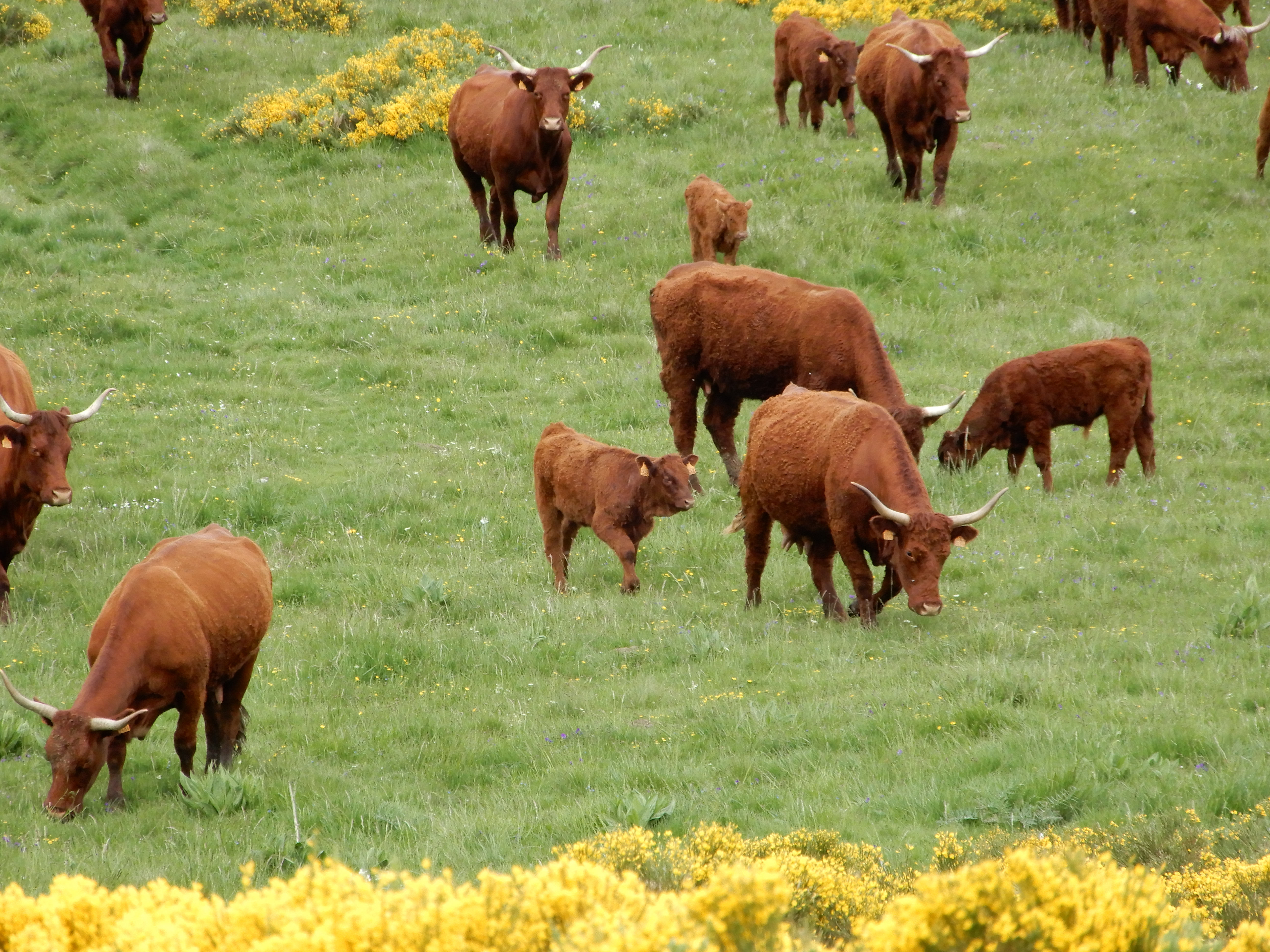 Des salers sur le Bec de l'Aigle, dans le Cantal, au mois de juin, lors de la floraison des genêts.